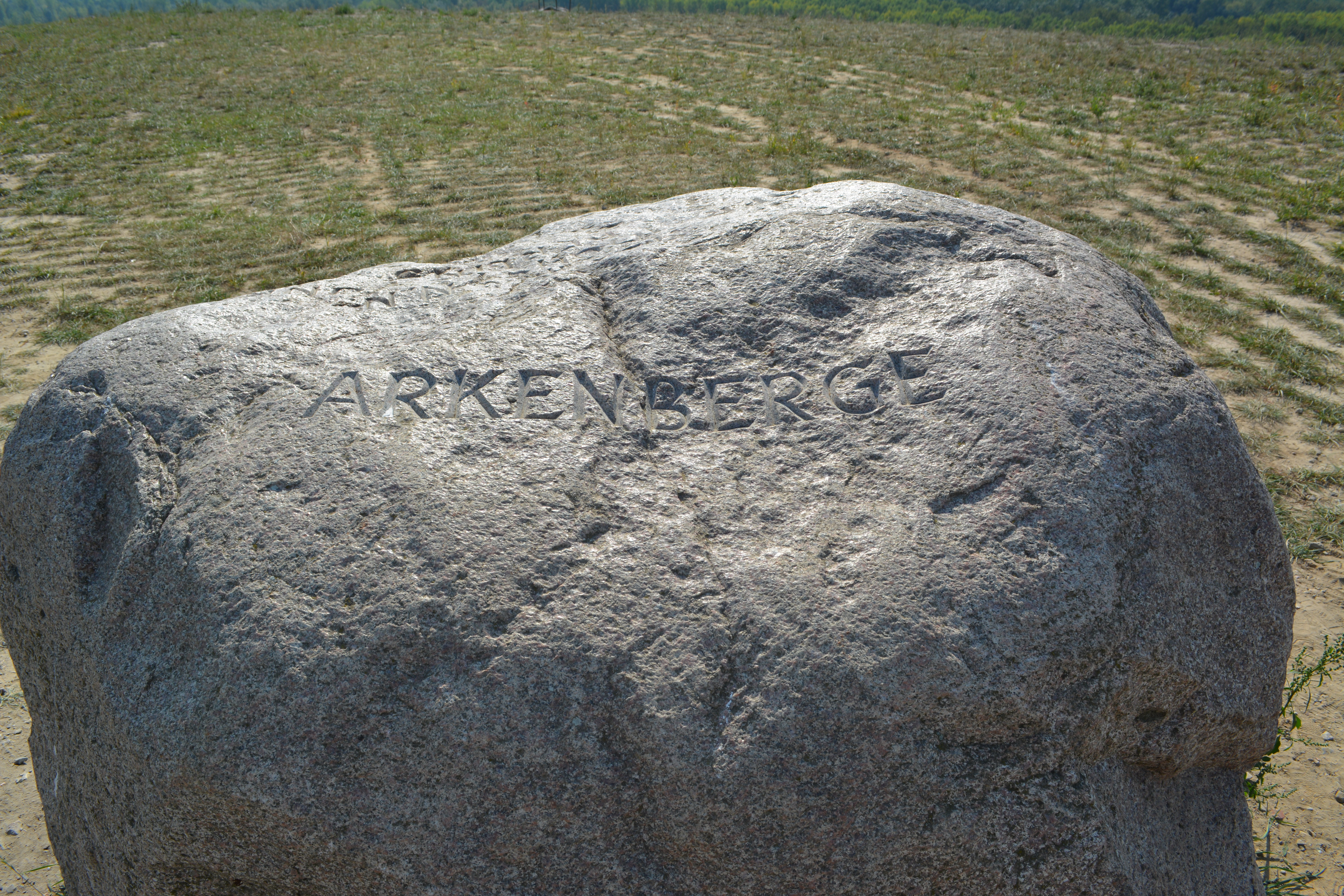 Findling auf dem Gipfel der ehemaligen Bauschuttdeponie Arkenberge